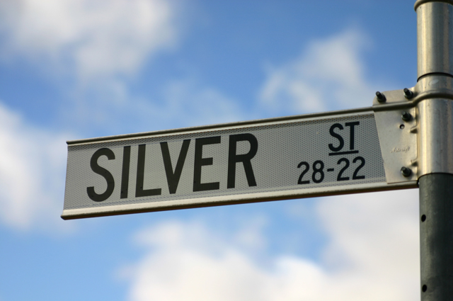 Ein Straßenschild aus der australischen Stadt Broken Hill.